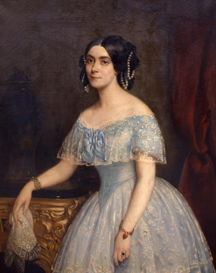 Emma Mac Kinnon, duchesse de Gramont